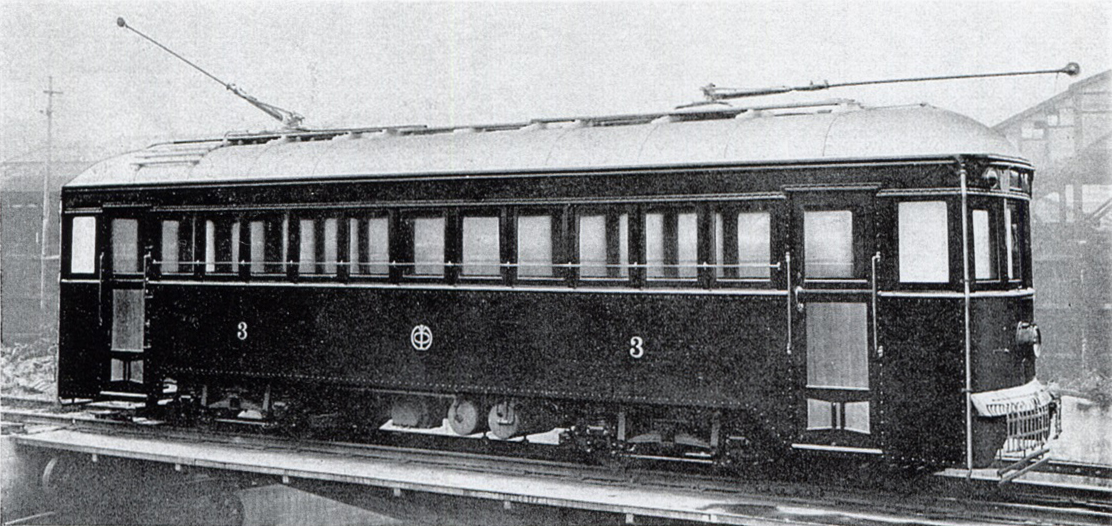 武蔵中央電気鉄道1形3号車。製造元の日本車輌製造本店にて落成時に撮影された形式写真。